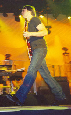 Keith Scott tocando en vivo en Madrid (España) en 2003.